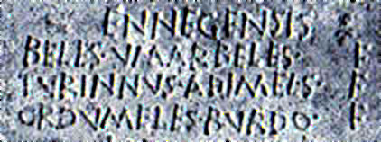 Detalle bronce de Ascoli